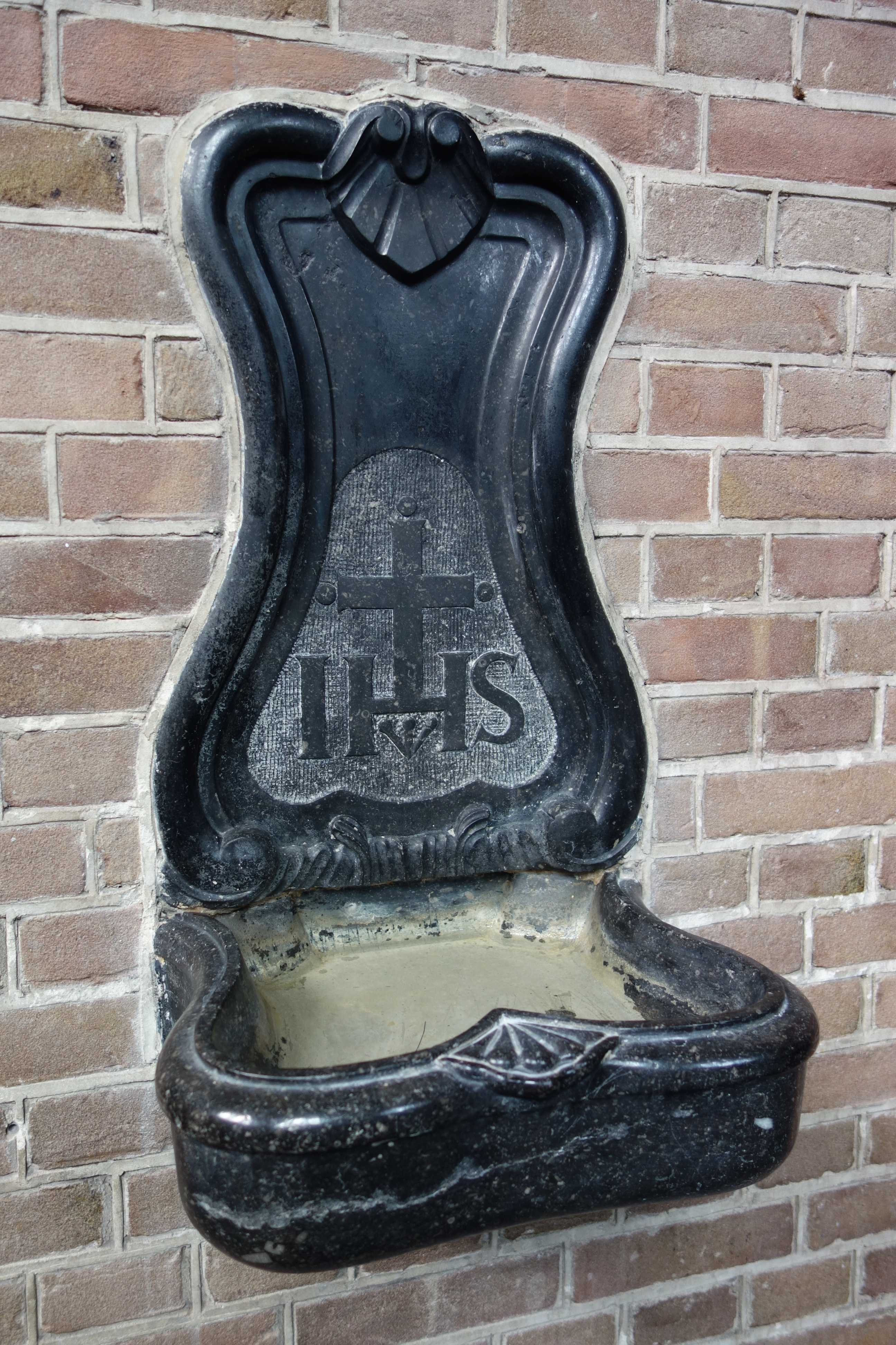 Natuurstenen wijwatervat nabij de ingang van de Sint-Nicolaaskerk in Lutjebroek.